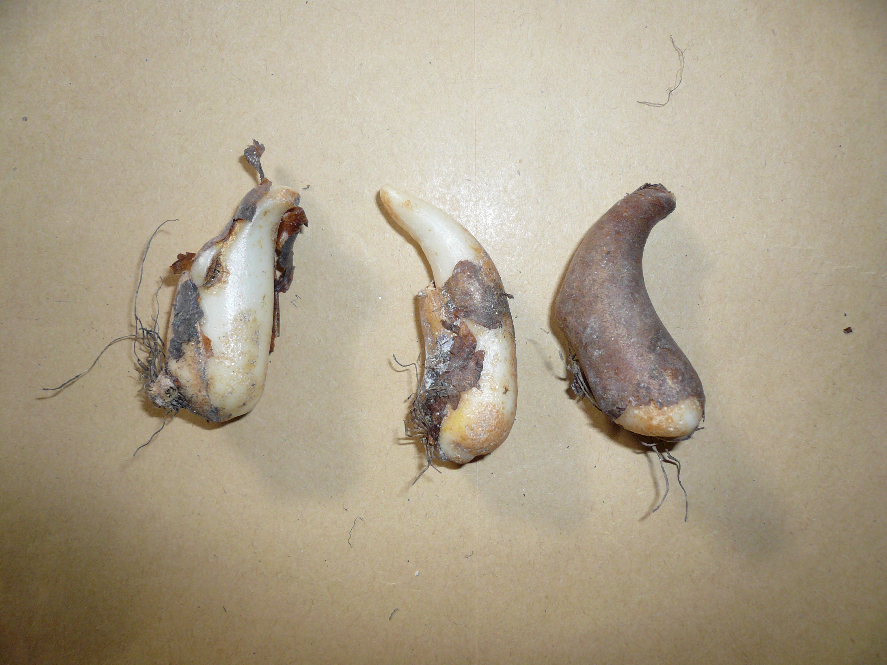 Bulbes de Erythronium 'White Beauty' - Voilà pourquoi les Erythronium sont appelés "Dent-de-chien"